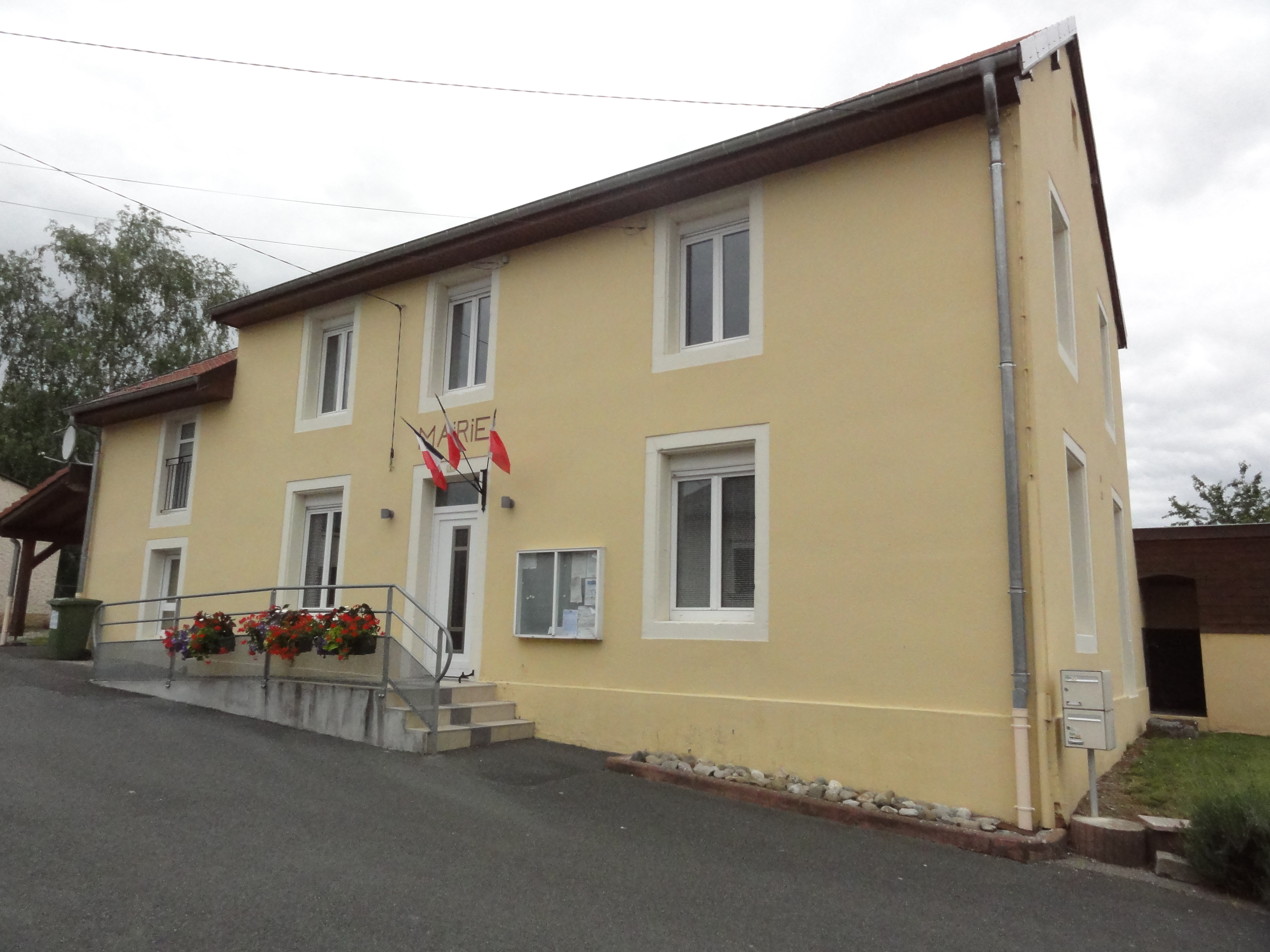 Barchain (Moselle) mairie